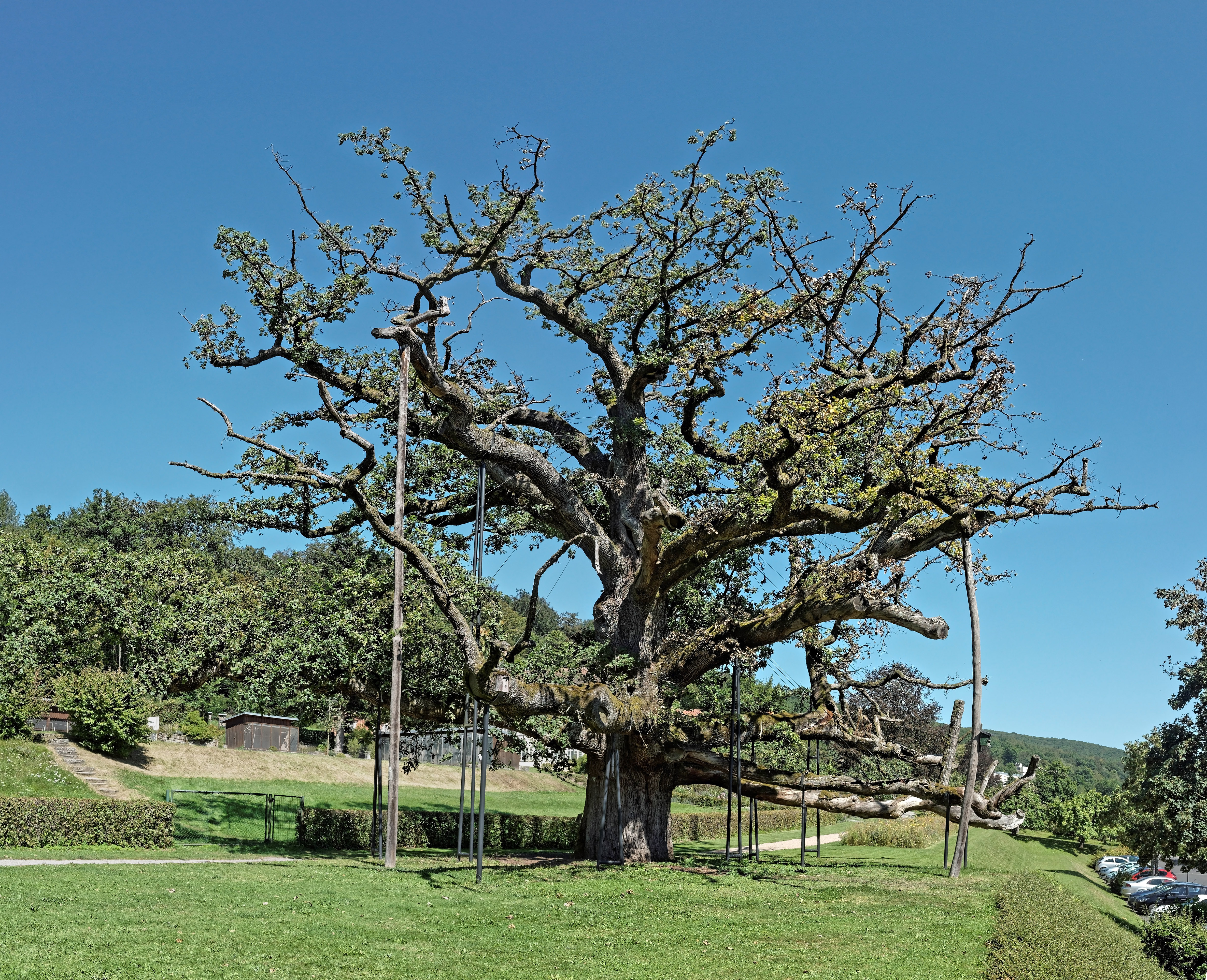 Die König-Ludwig-Eiche (auch Königseiche, Tausendjährige Eiche, bis Mitte des 19. Jahrhunderts Stolze Eiche) ist ein Naturdenkmal im Staatsbad Brückenau im Landkreis Bad Kissingen in Bayern. Sie ist nach unterschiedlichen Schätzungen 360 bis 700 Jahre alt. Der Umfang des Stammes beträgt etwa sieben Meter. Sie hat ihren Namen von König Ludwig I., dessen Lieblingseiche sie bei seinen zahlreichen Kuraufenthalten im Staatsbad Brückenau war. Die Eiche wurde seit 1780 oft beschrieben und abgebildet. Zahlreiche Adelige aus dem Inland und Monarchen aus dem Ausland, die zur Kur in Brückenau weilten, besuchten die Eiche